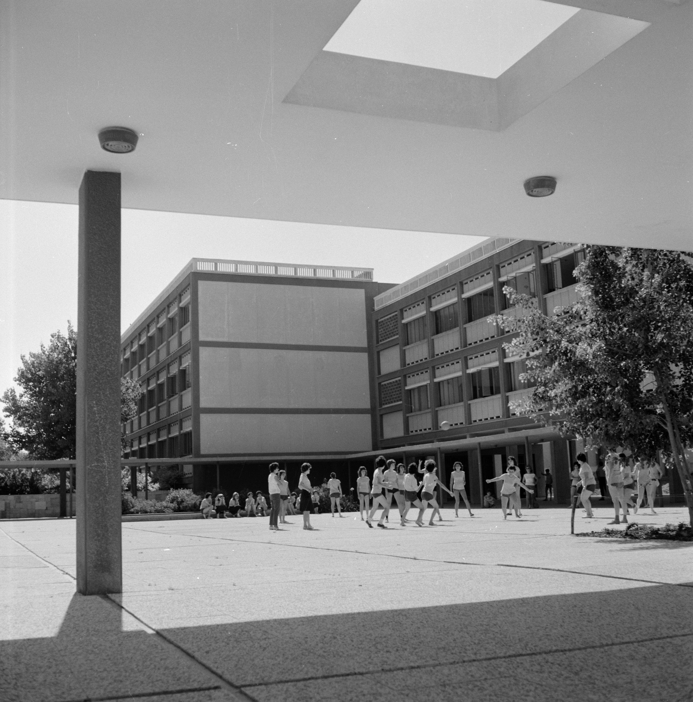 Collectie / Archief : Fotocollectie Van de Poll Reportage / Serie : [ onbekend ] Beschrijving : Alliance gymnasium. Meisjes zijn op het schoolplein aan het sporten Datum : 1 januari 1963 Locatie : Israël Trefwoorden : gymnasia, kinderen, leerlingen, onderwijs, scholen, sport Fotograaf : Poll, Willem van de, [onbekend] Auteursrechthebbende : Nationaal Archief Materiaalsoort : Negatief (zwart/wit) Nummer archiefinventaris : bekijk toegang 2.24.14.02 Bestanddeelnummer : 255-4692